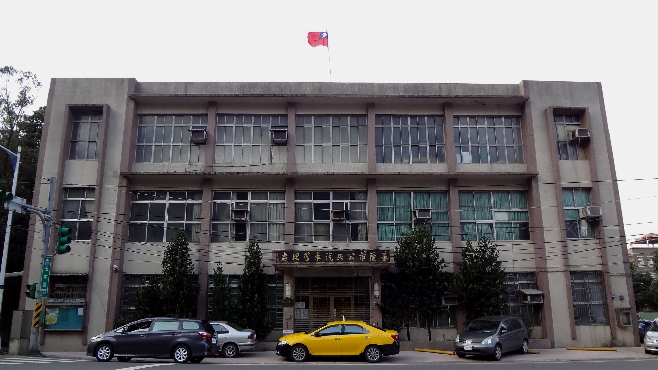 基隆市公共汽車管理處，位於臺灣基隆市中正區中正路103號。